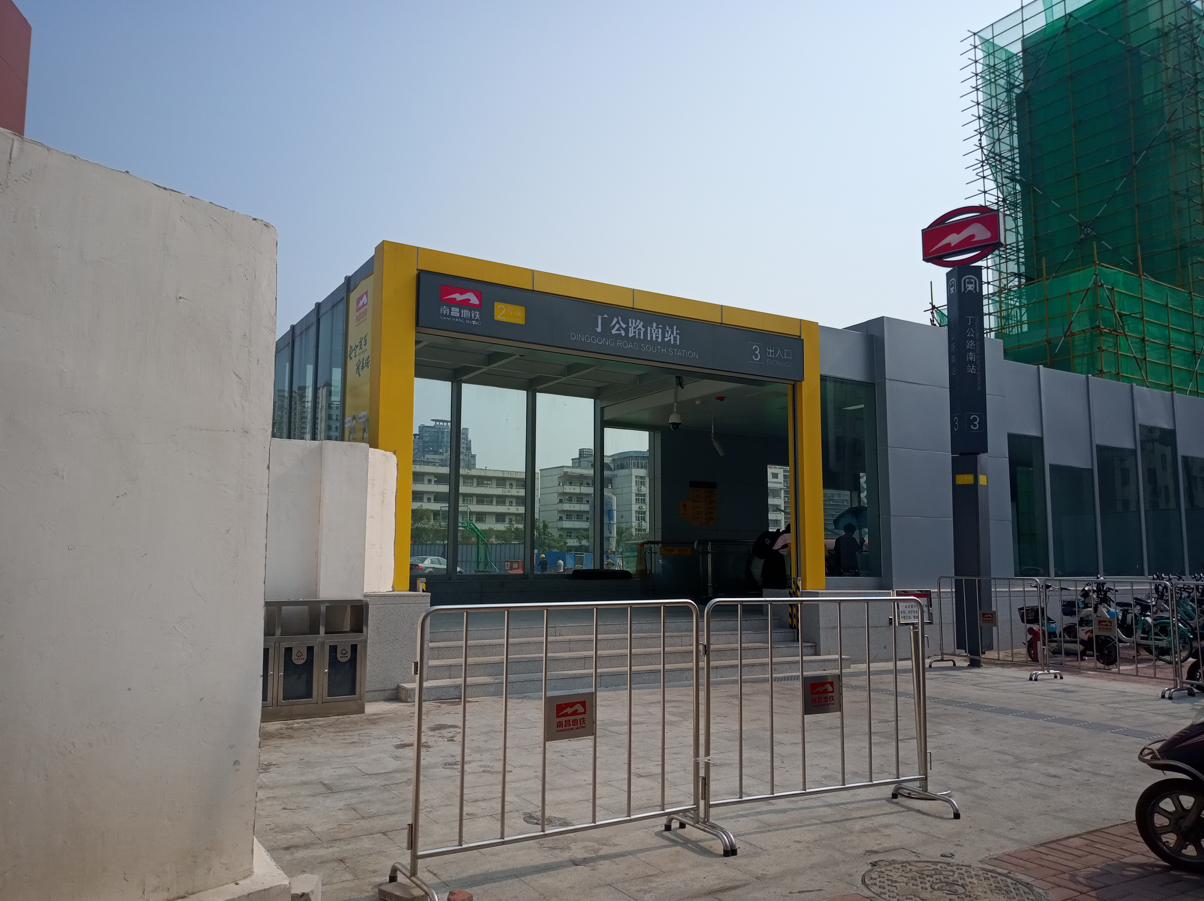 南昌地铁二号线丁公路南站